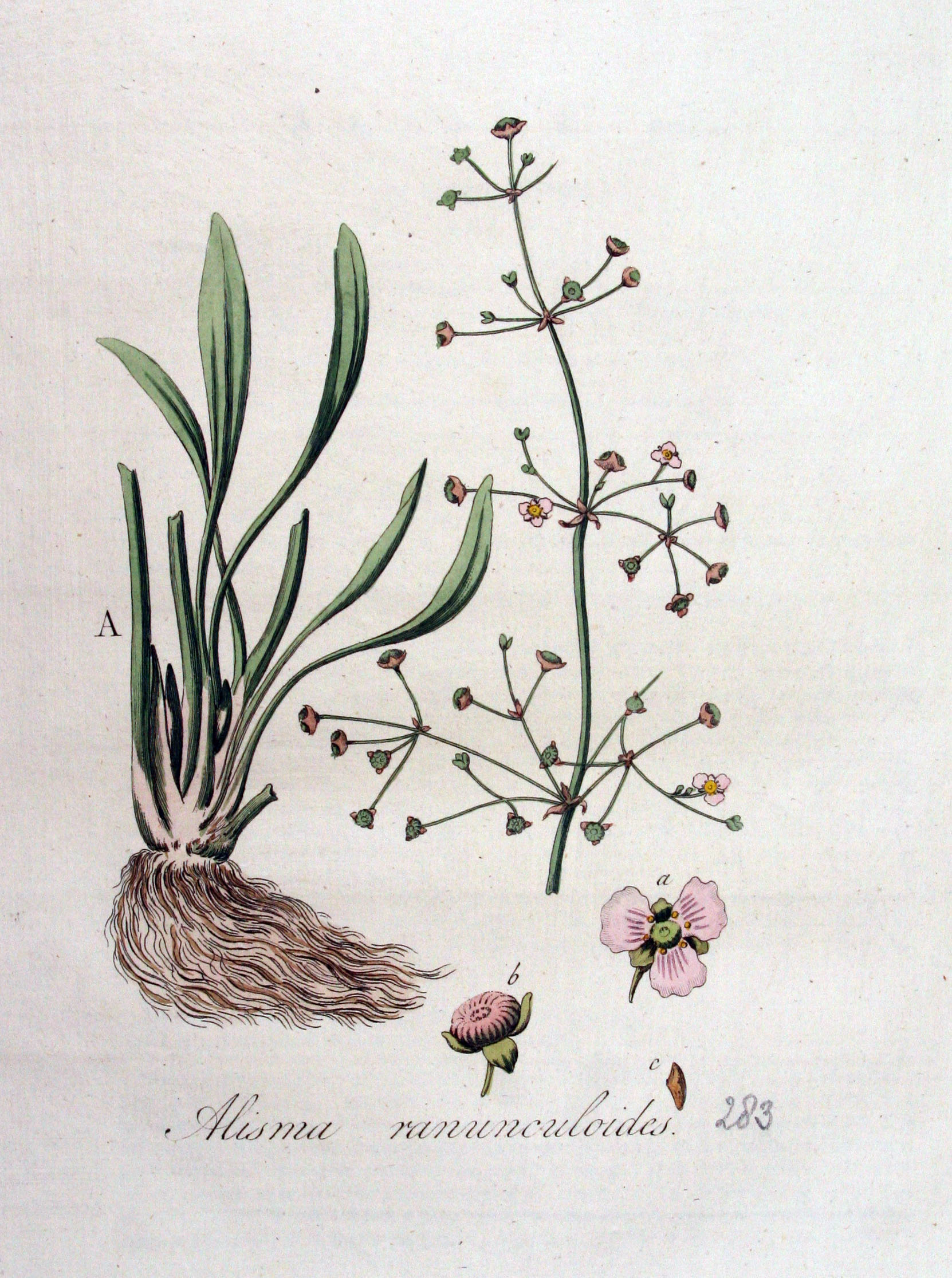 Baldellia ranunculoides (L.) Parl. (Syn. Alisma ranunculoides L.)